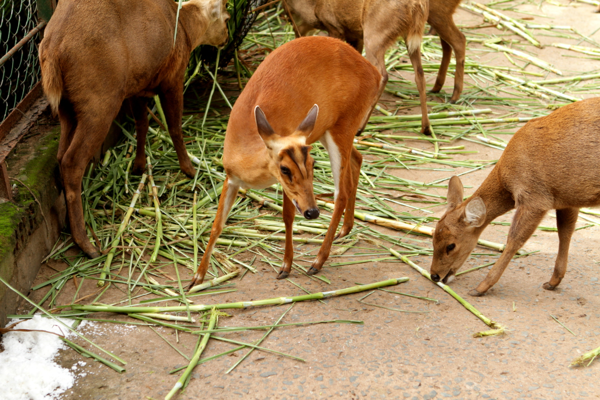 Deer